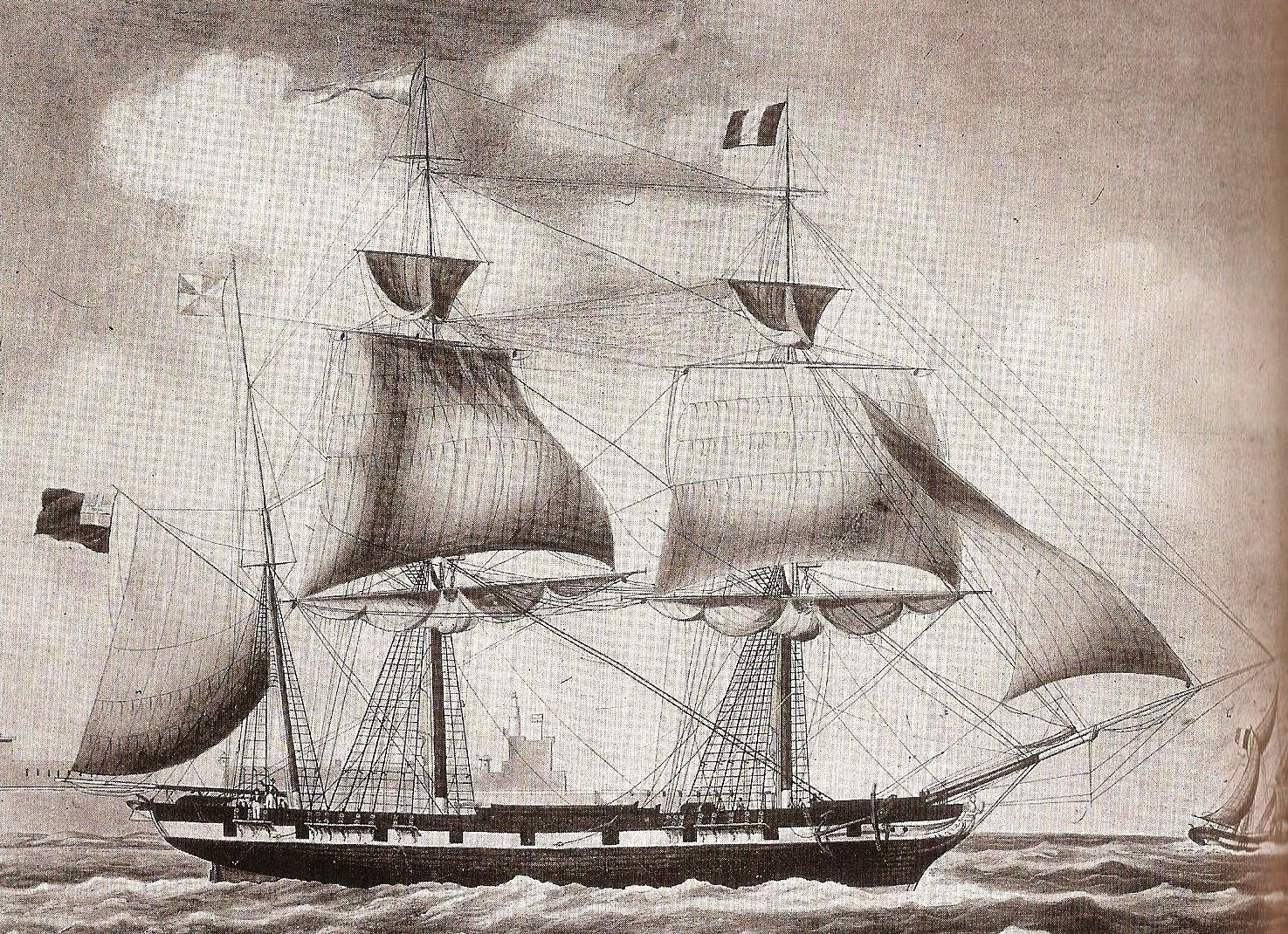 Acquerello ritraente la corvetta sarda, poi italiana, Aurora in uscita da Genova